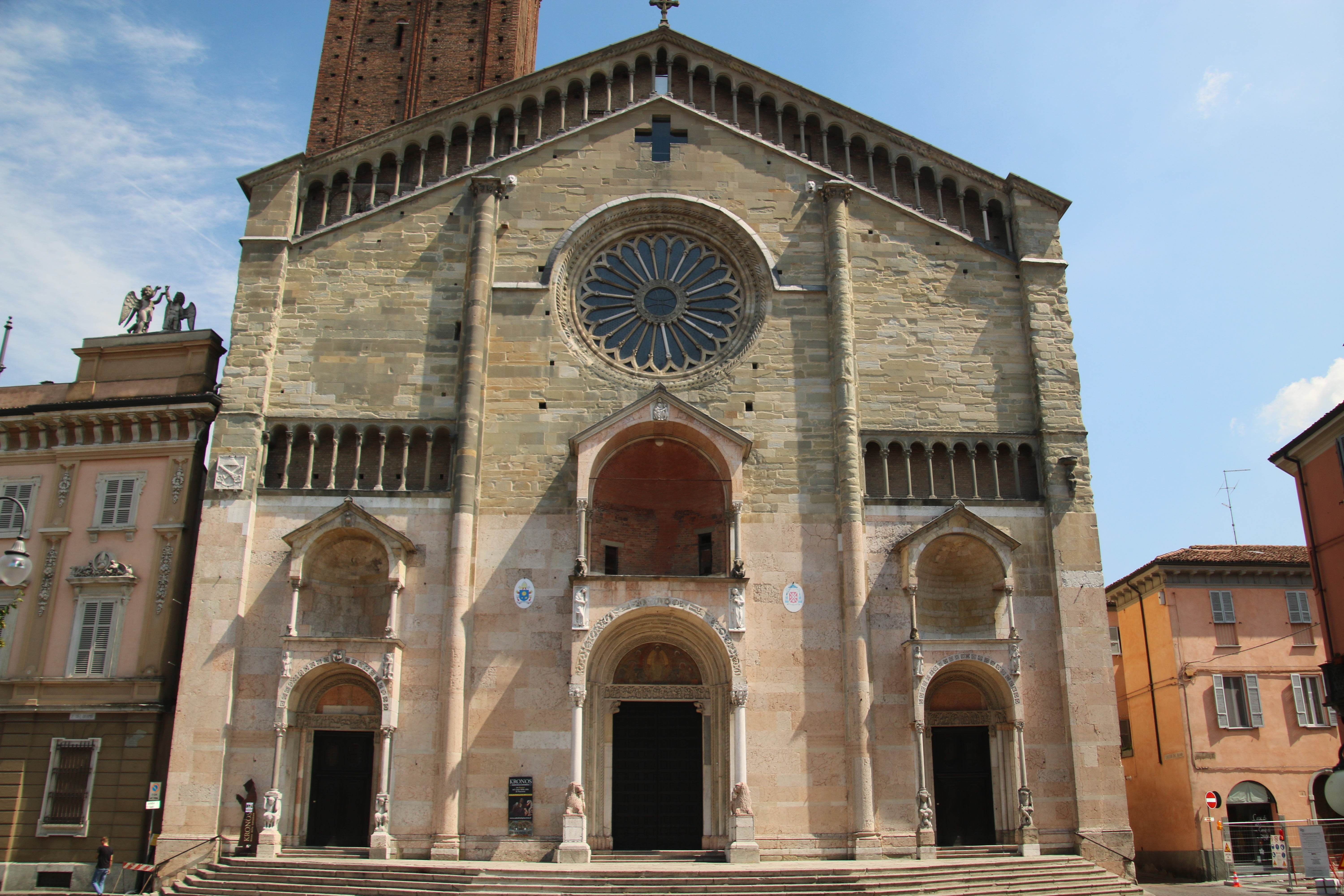 duomo di Piacenza This is a photo of a monument which is part of cultural heritage of Italy.